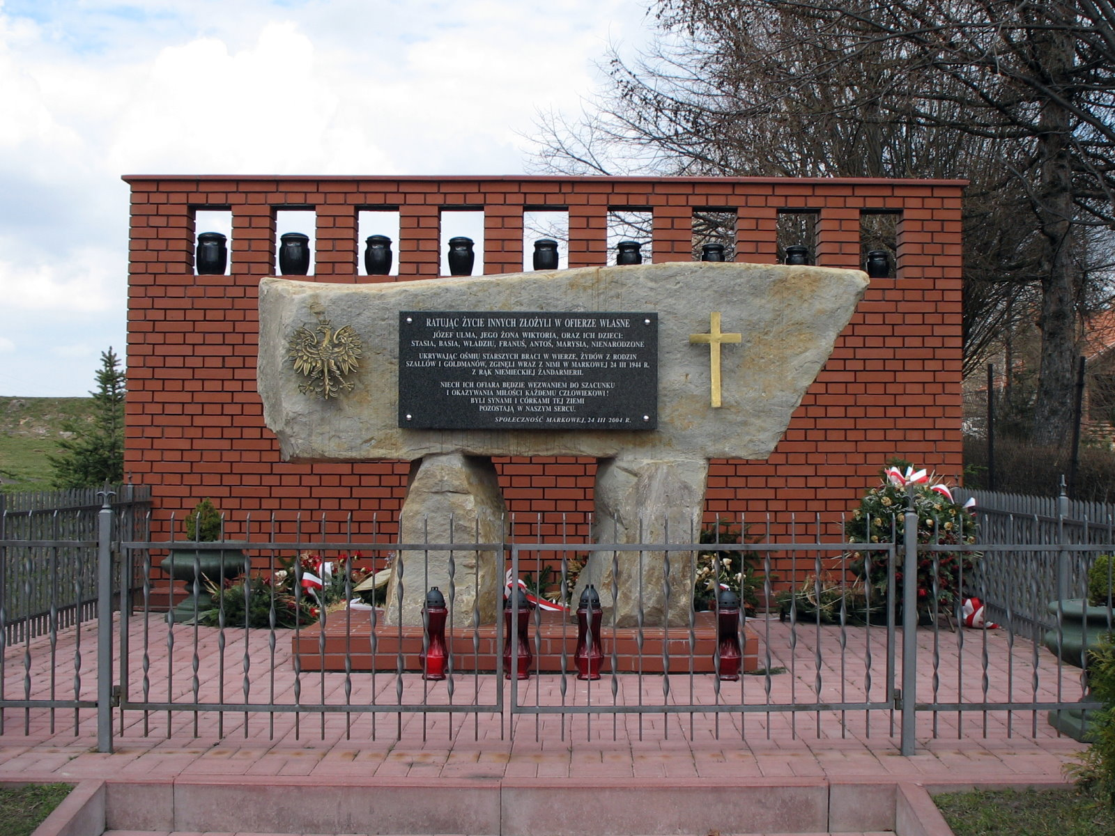 Markowa (Polska) - pomnik rozstrzelanych w 1944 r.